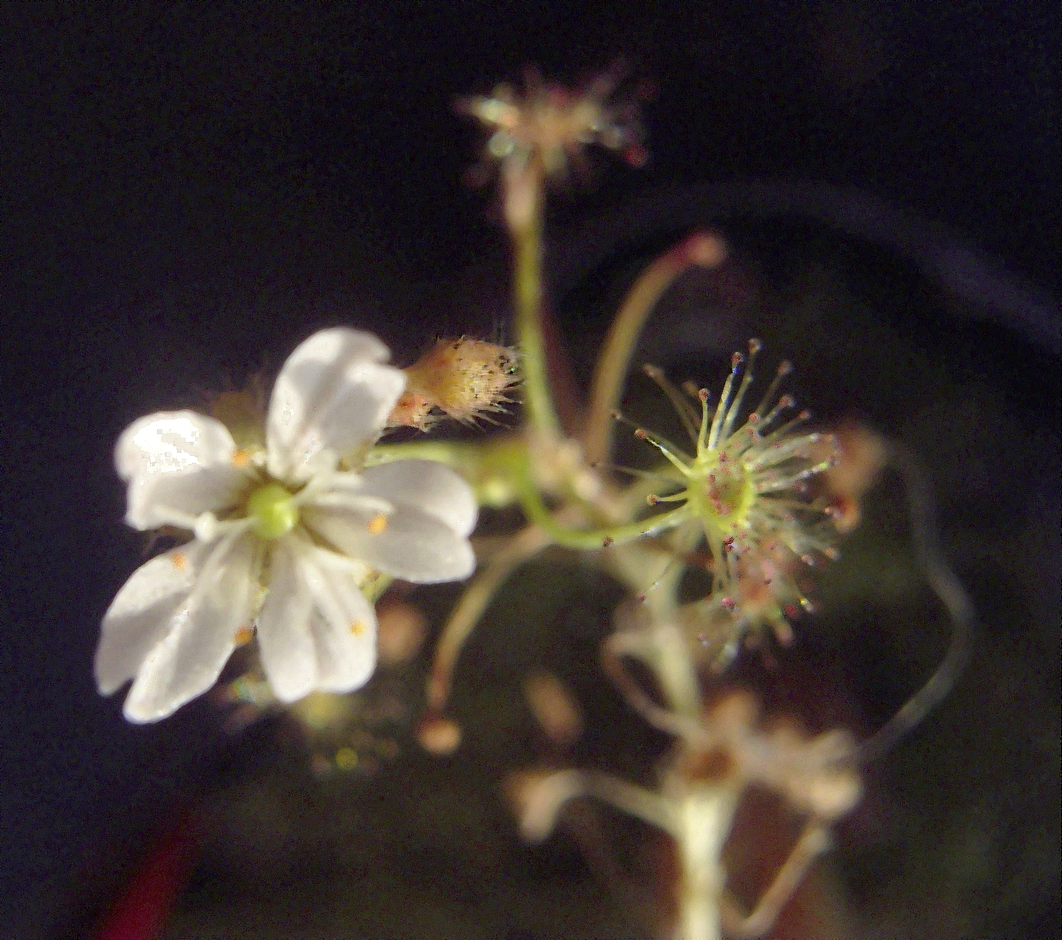 Drosera banksii apex